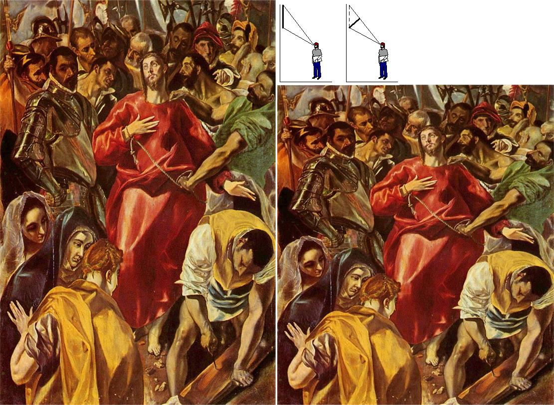 El Greco-perspektíva a festő El Expolio című festménye felhasználásával